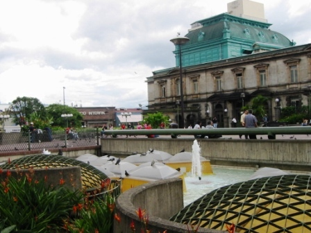 Vista del costado norte del Teatro Nacional desde la fuente - lucernario